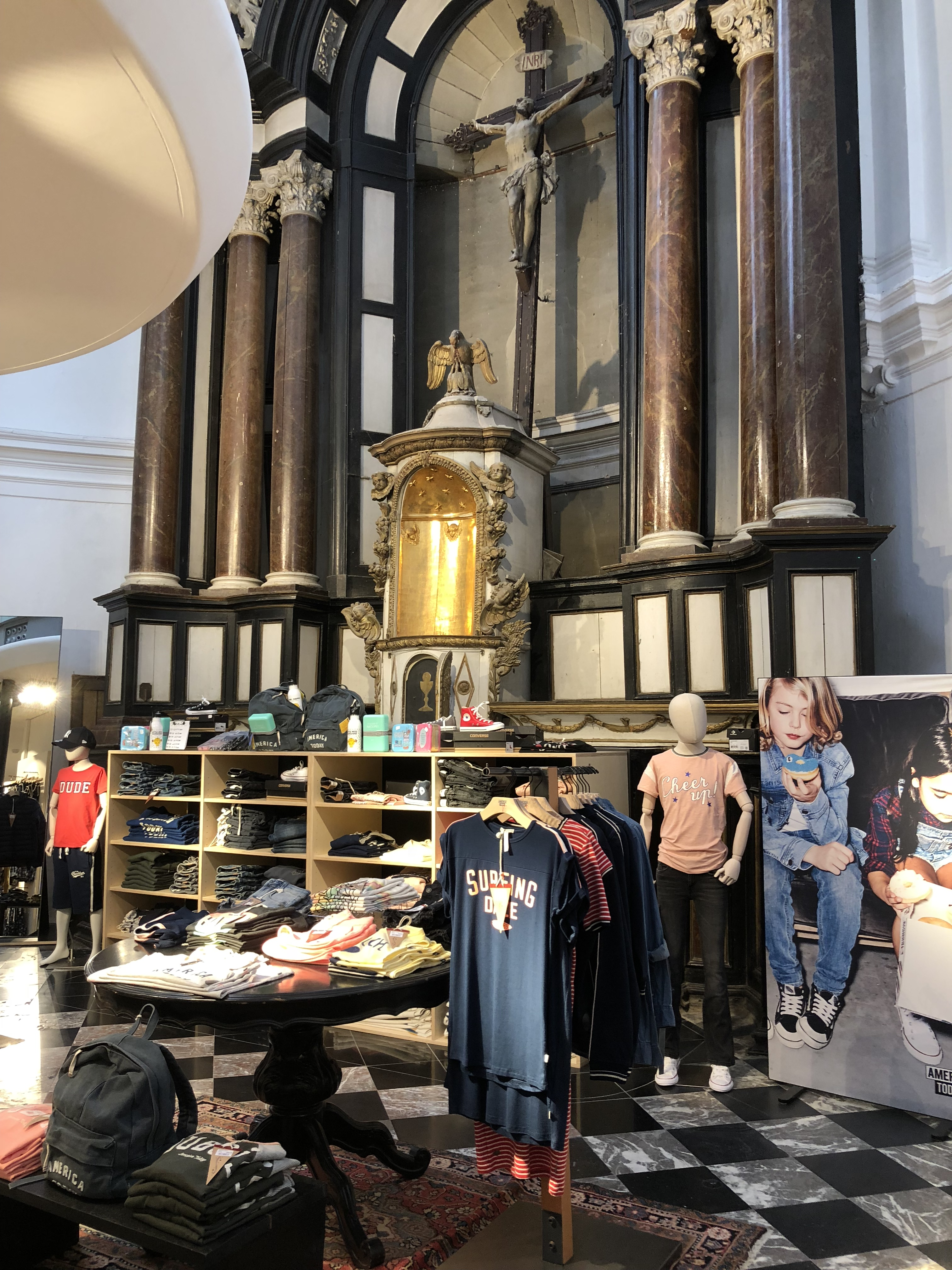 Intérieur de l'Église Saint-Jacques de Namur - magasin "America Today"